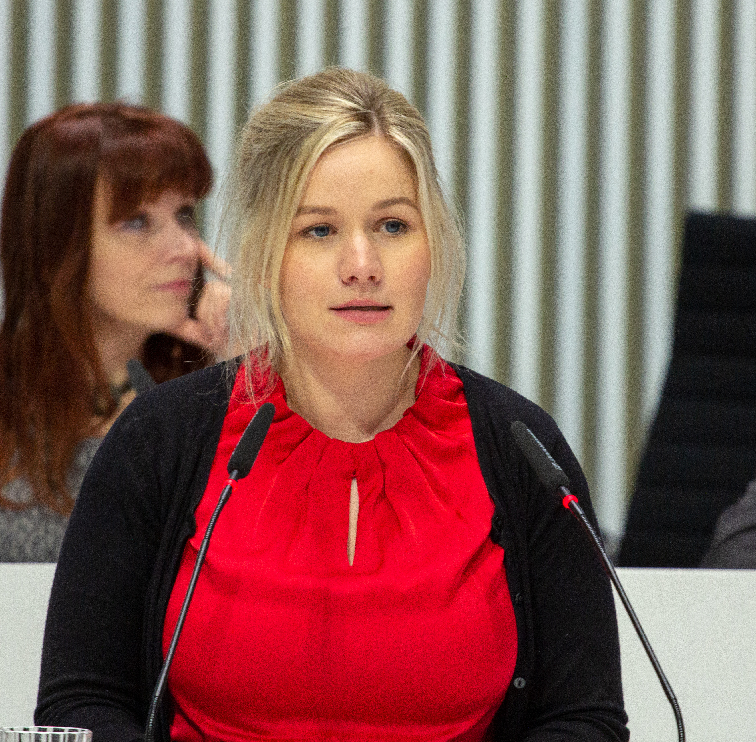 Nadine Julitz im Plenum des Landtages Mecklenburg-Vorpommern im März 2019.